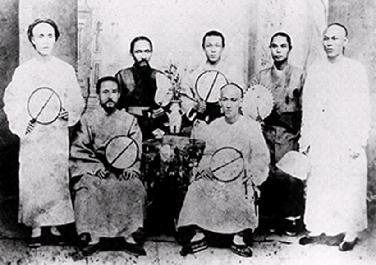 琉球復國運動菁英